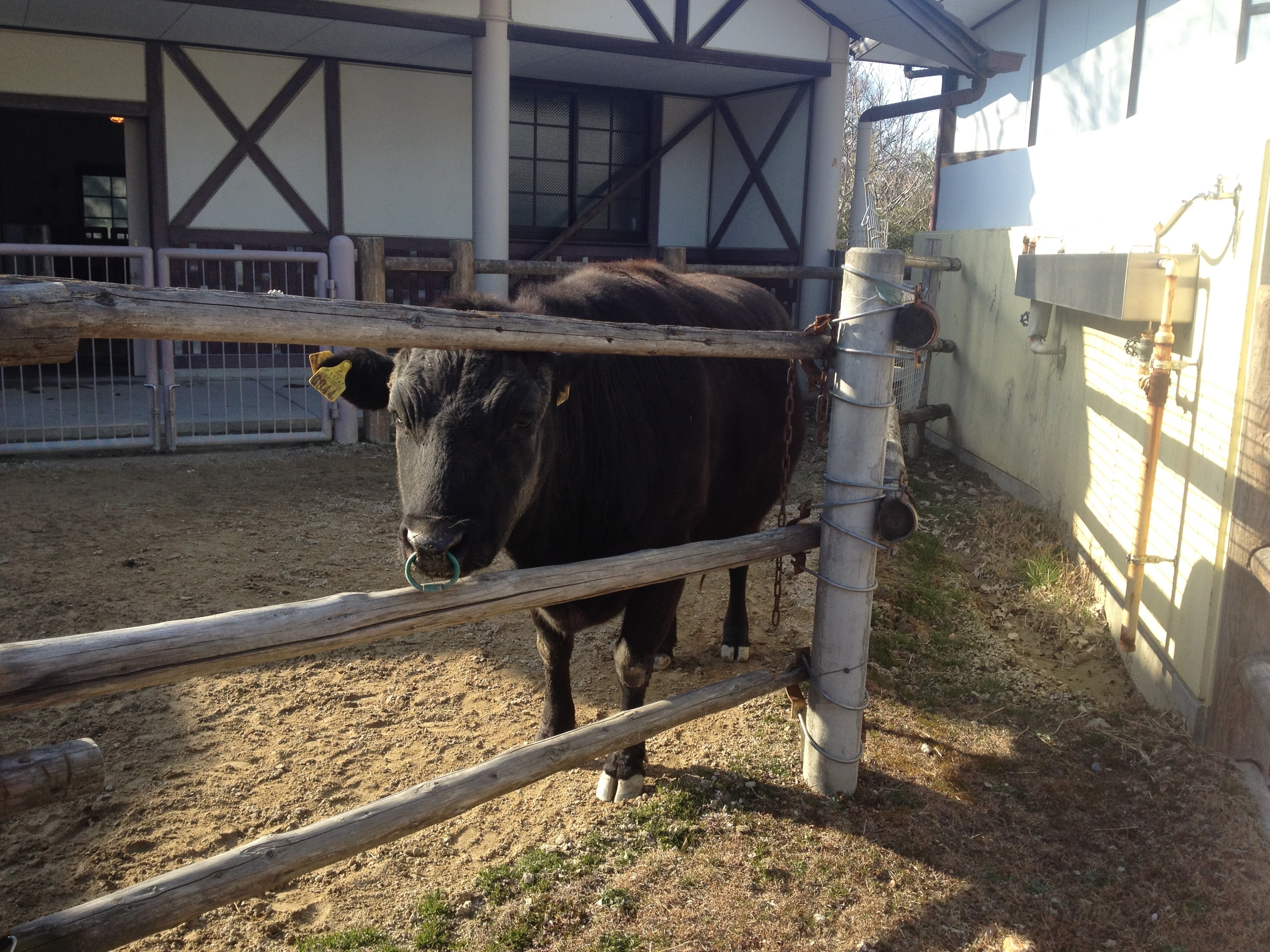 東山動植物園の「こども動物園」内で飼育されてる口之島牛。